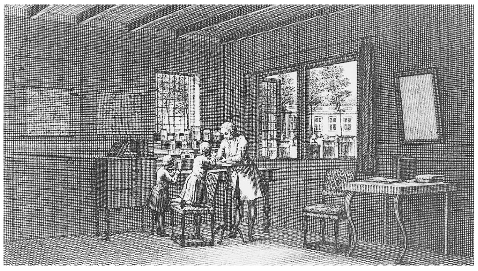 The laboratory of the naturalist Abraham Trembley, from his Mémoires, pour servir à l'histoire d'un genre de polypes d'eau douce, à bras en forme de cornes. Leiden: Chez Jean and Herman Verbeek, 1744